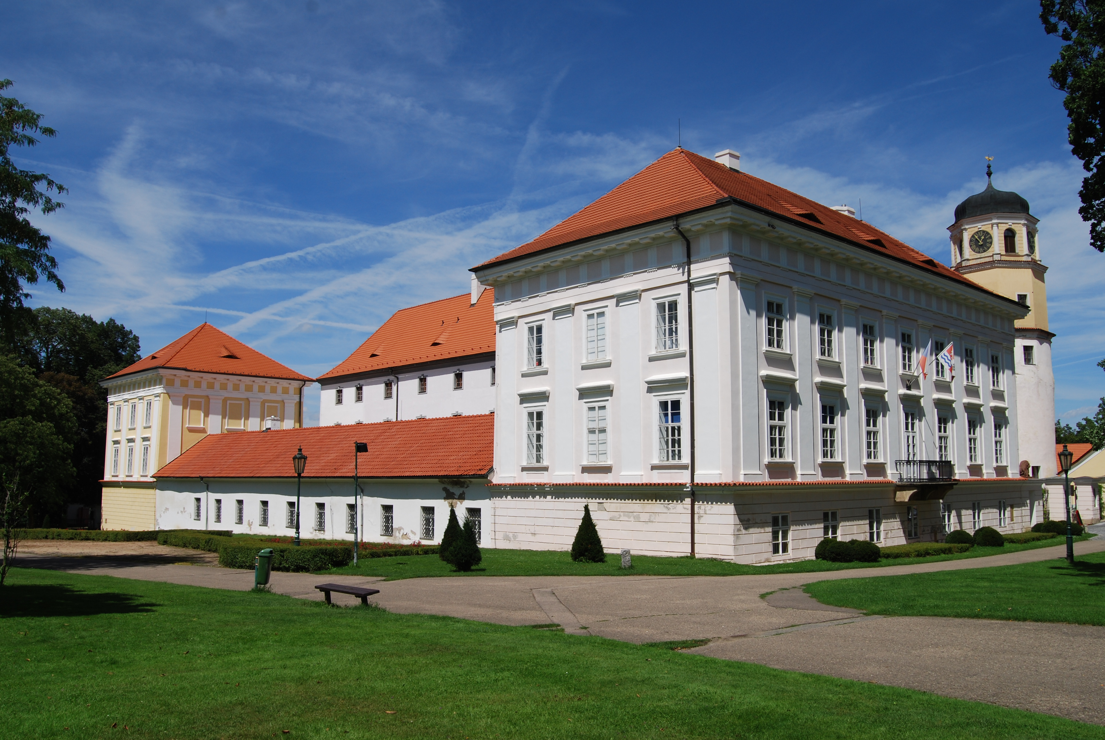 Zámek. Vlašim. Okres Benešov. Česká republika.